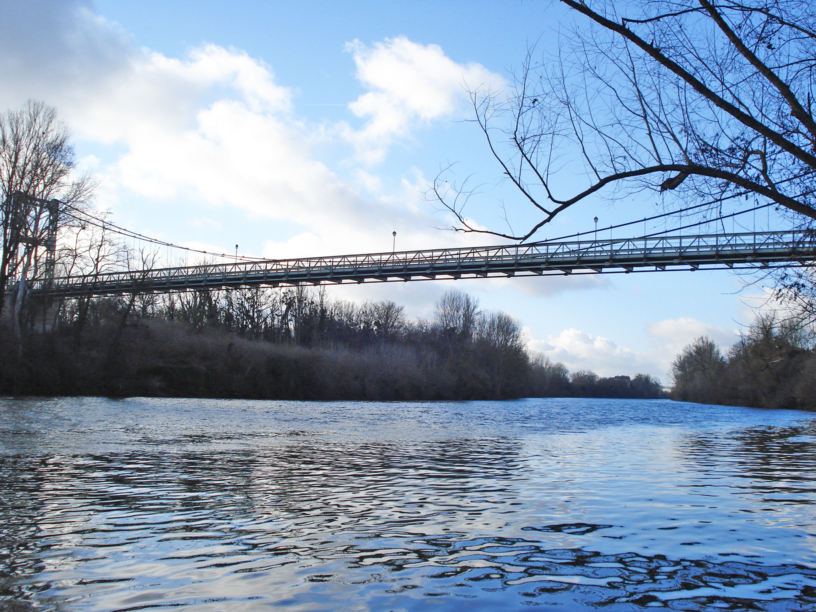 Photo du Pont de mirepoix sur le Tarn